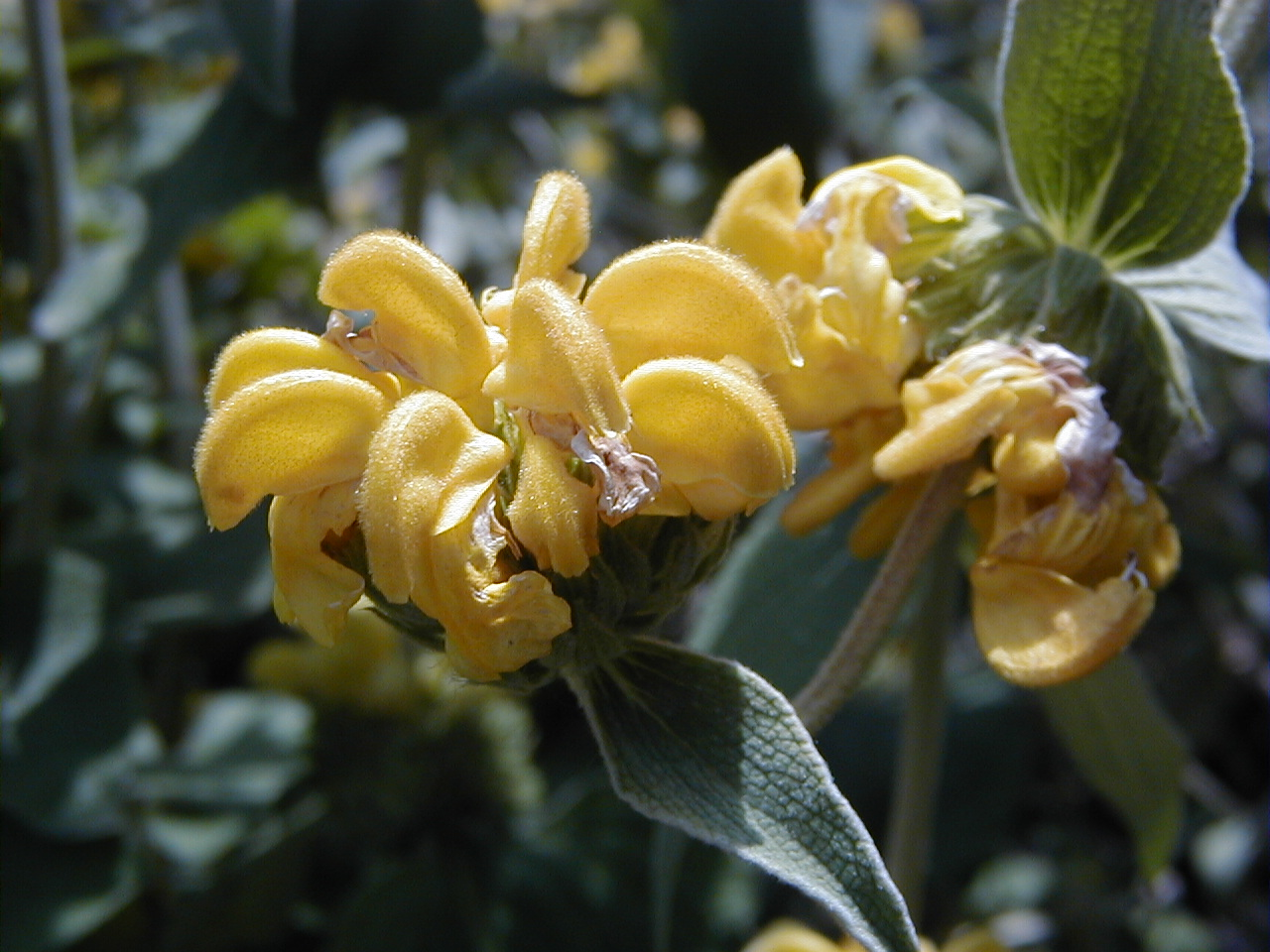 Phlomis fruticosa. Real Jardín Botánico de Madrid.